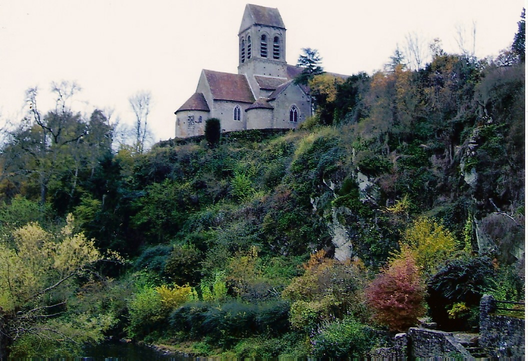 Eglise de Saint-Céneri-le-Gérei (Orne), dont les peintures murales datent des 12ème et 14ème siècles